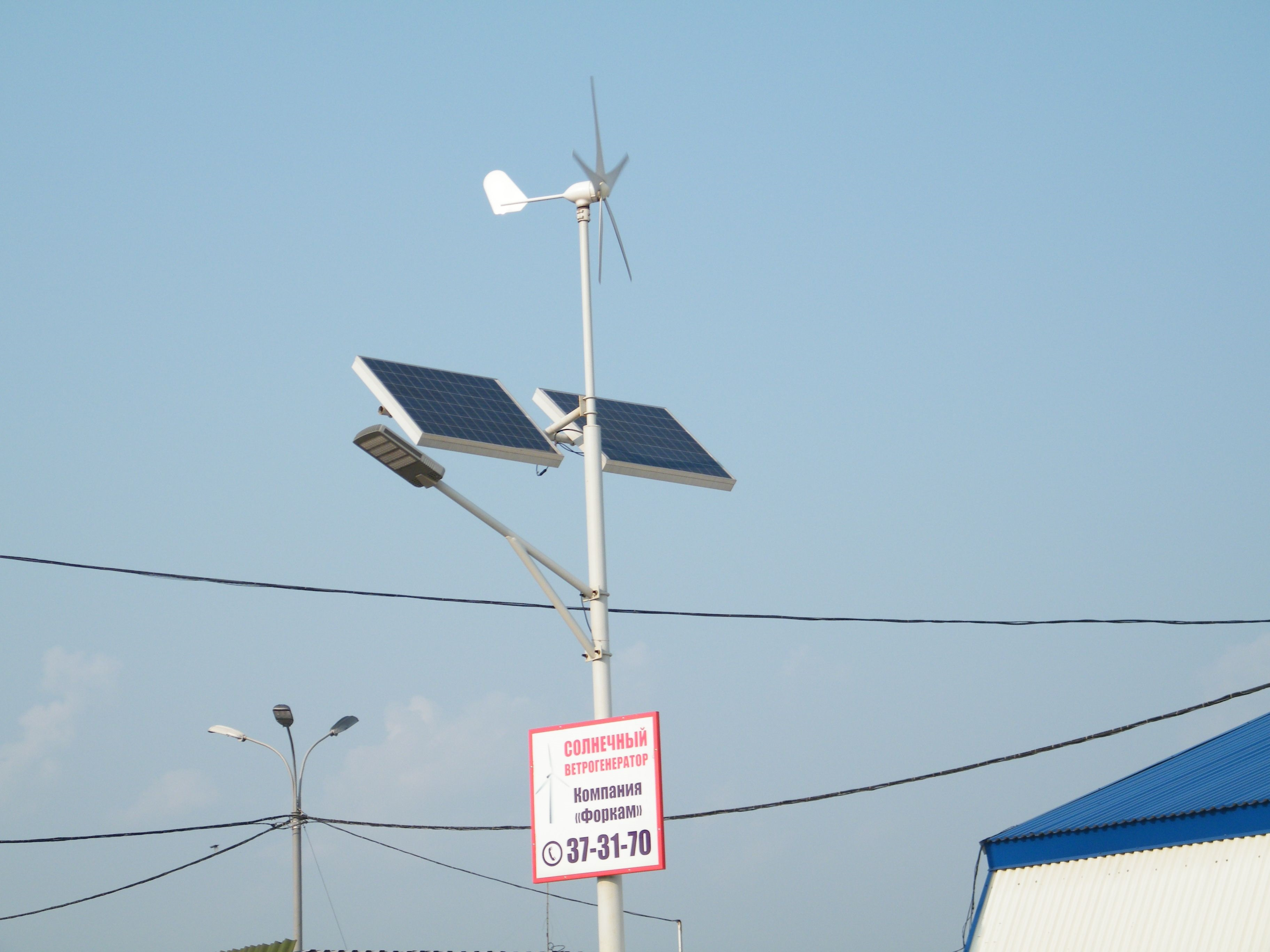 Солнечный ветрогенератор Хабаровский край